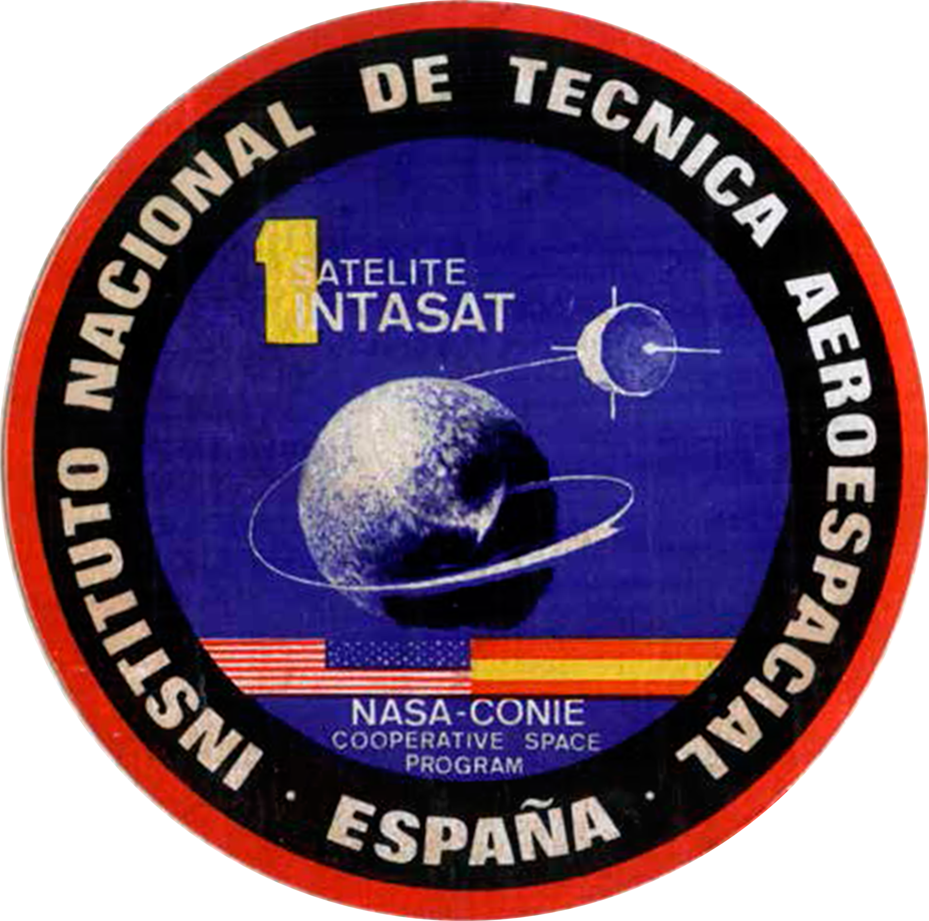 Insignia de la misión Intasat-1 del INTA